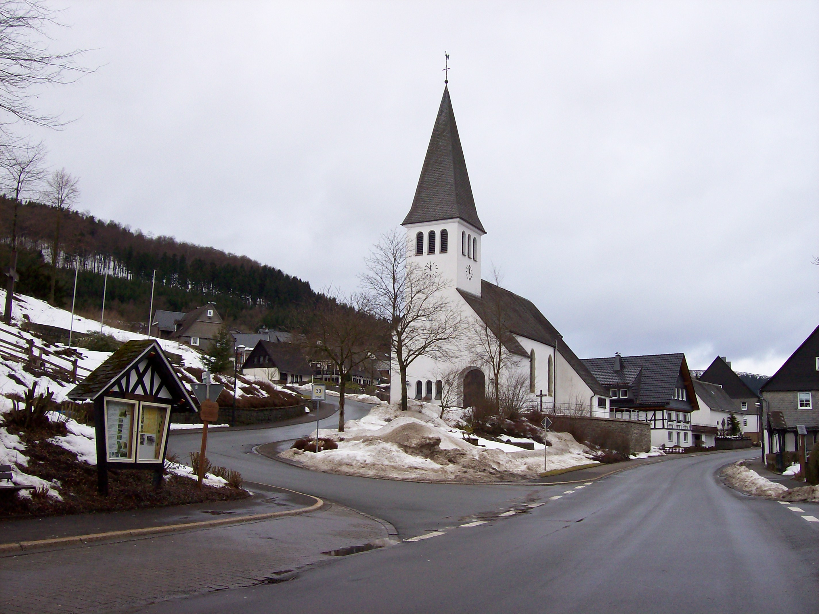 Olsberg-Elpe, Kirche (Germany)